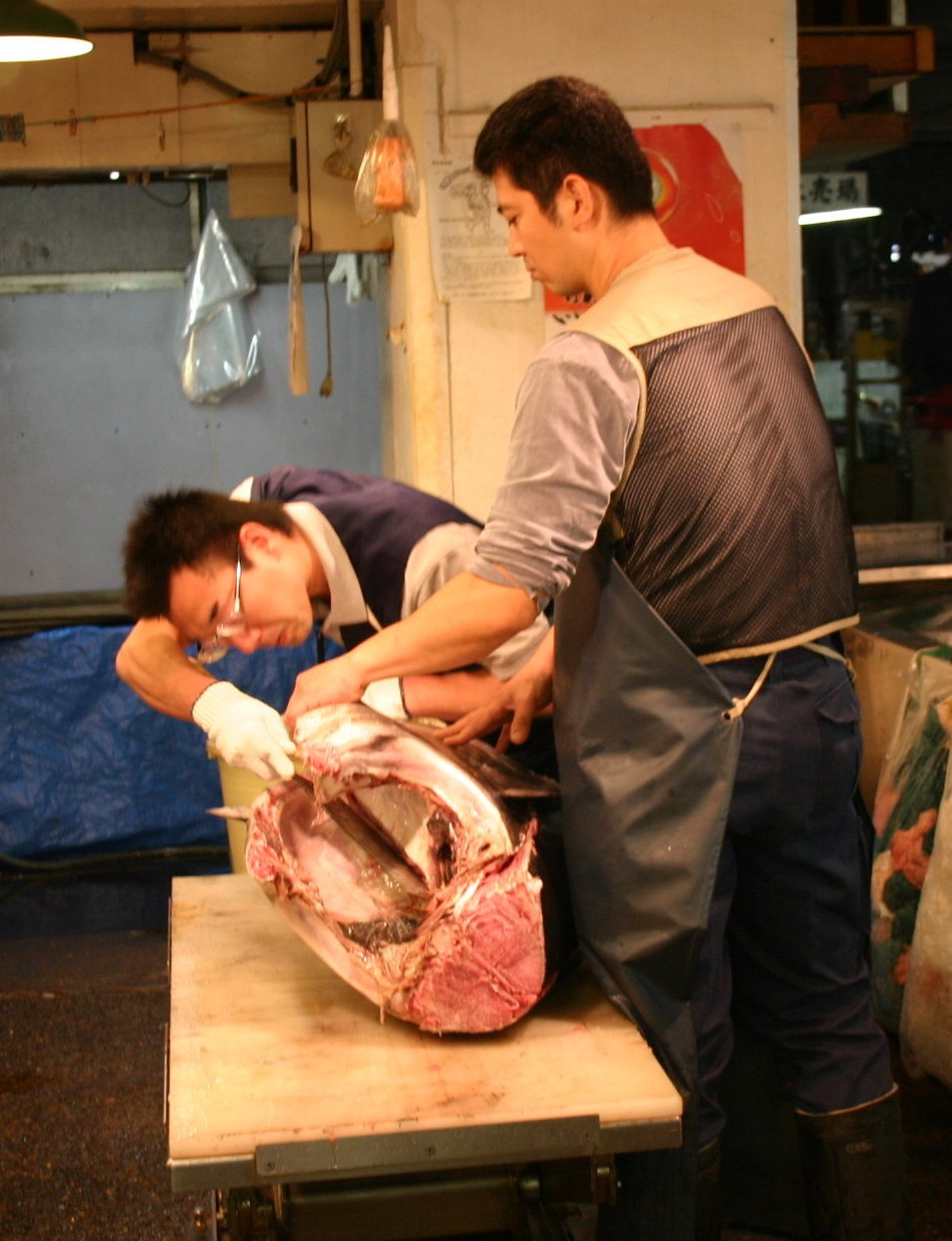 Foto scattata da me a Tsukiji il mercato ittico di Tokyo il